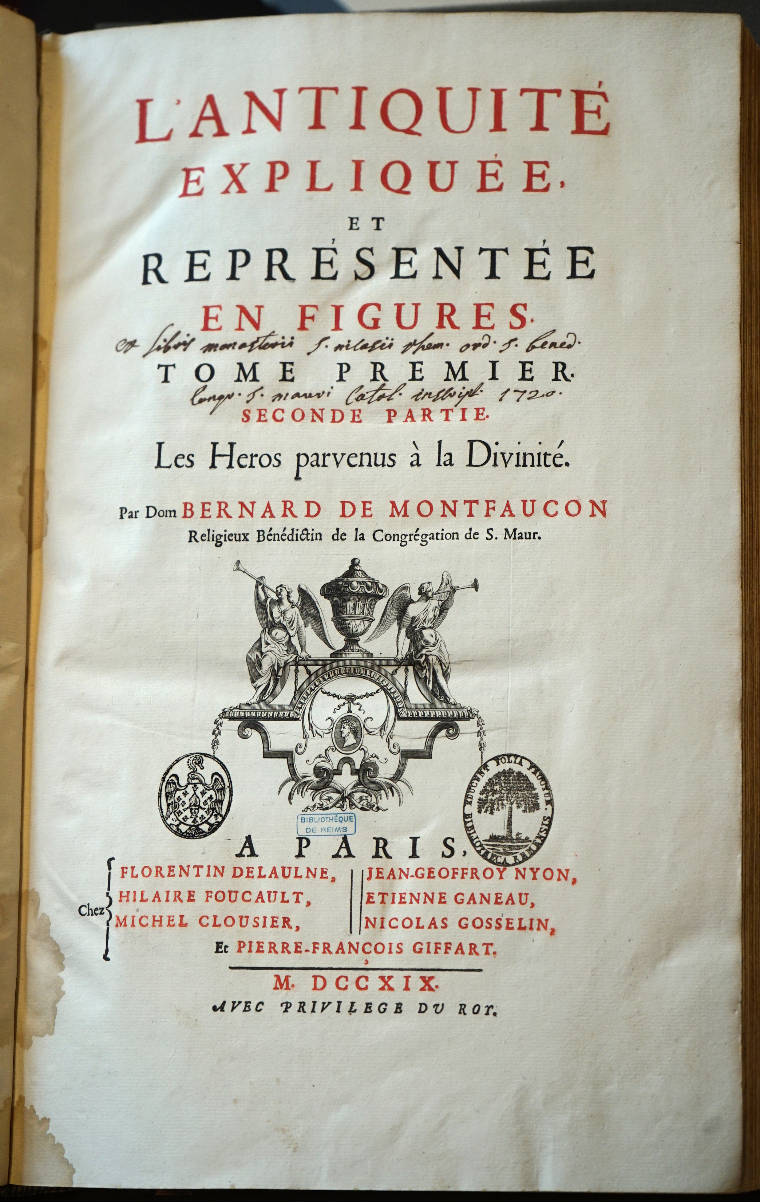 extrait du livre.